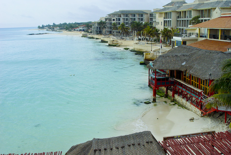 Centro, 77710 Playa del Carmen, Q.R., Mexico